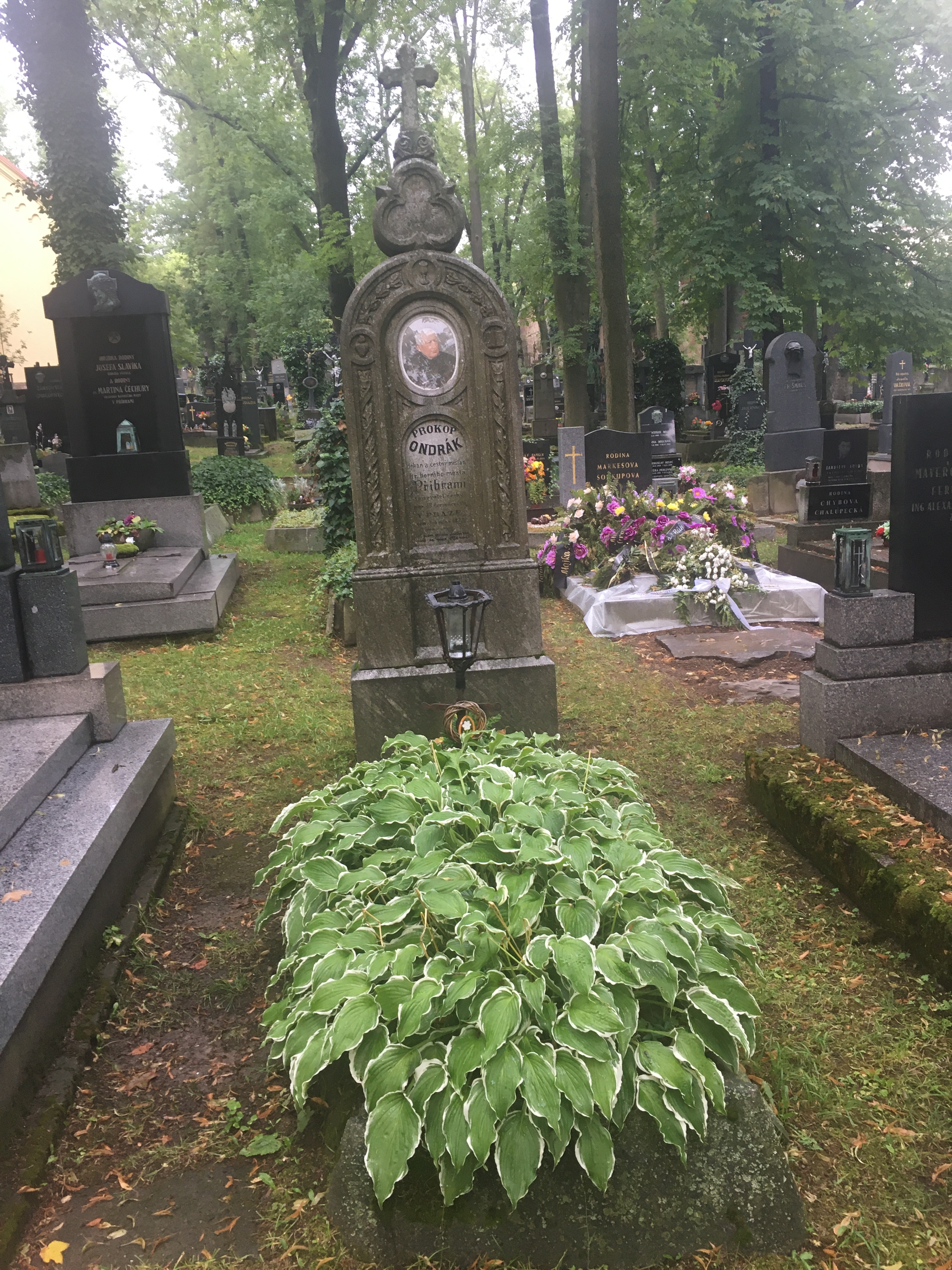 Hrob Prokopa Ondráka v Příbrami